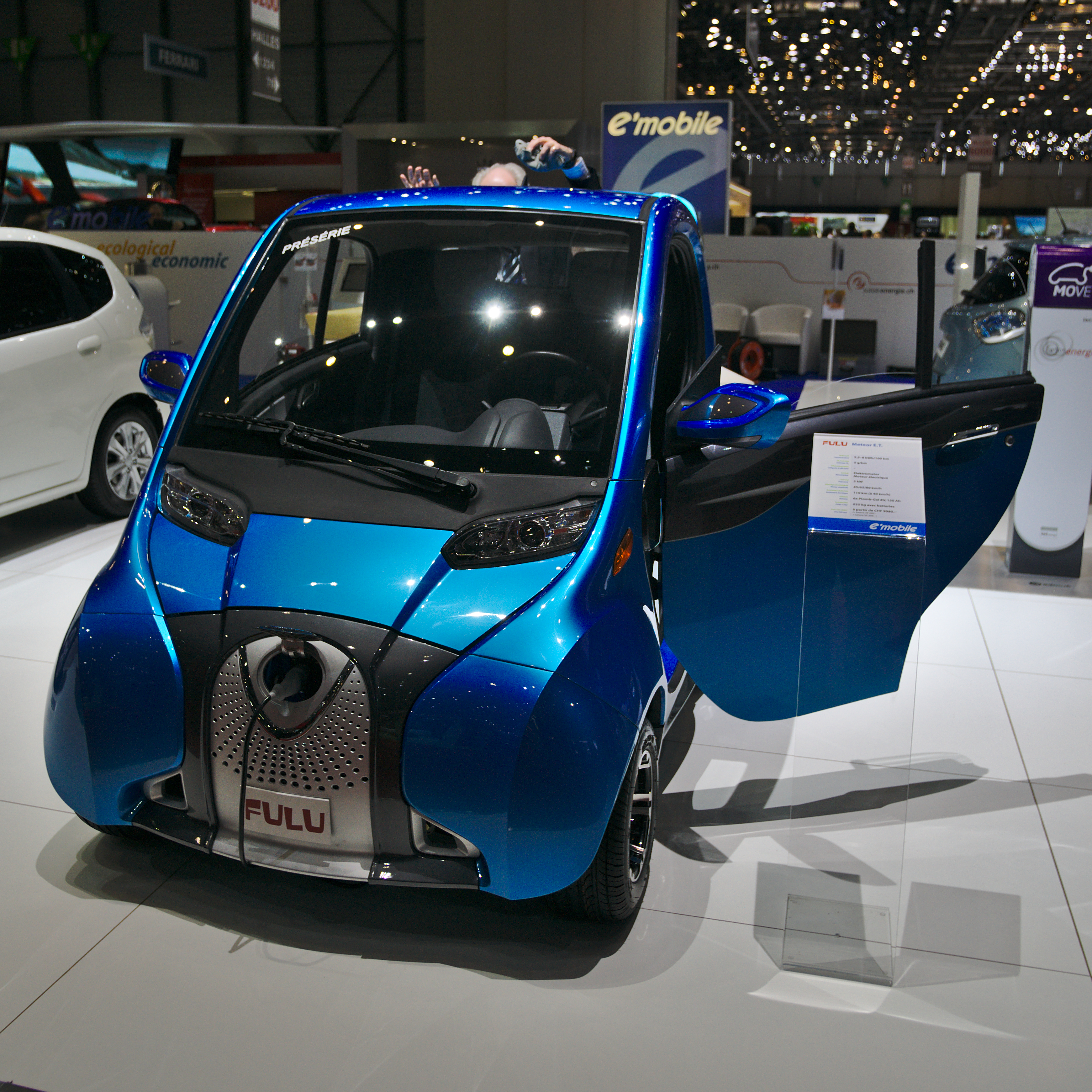 Salon de l'auto de Genève 2014 - 20140305 - Fulu